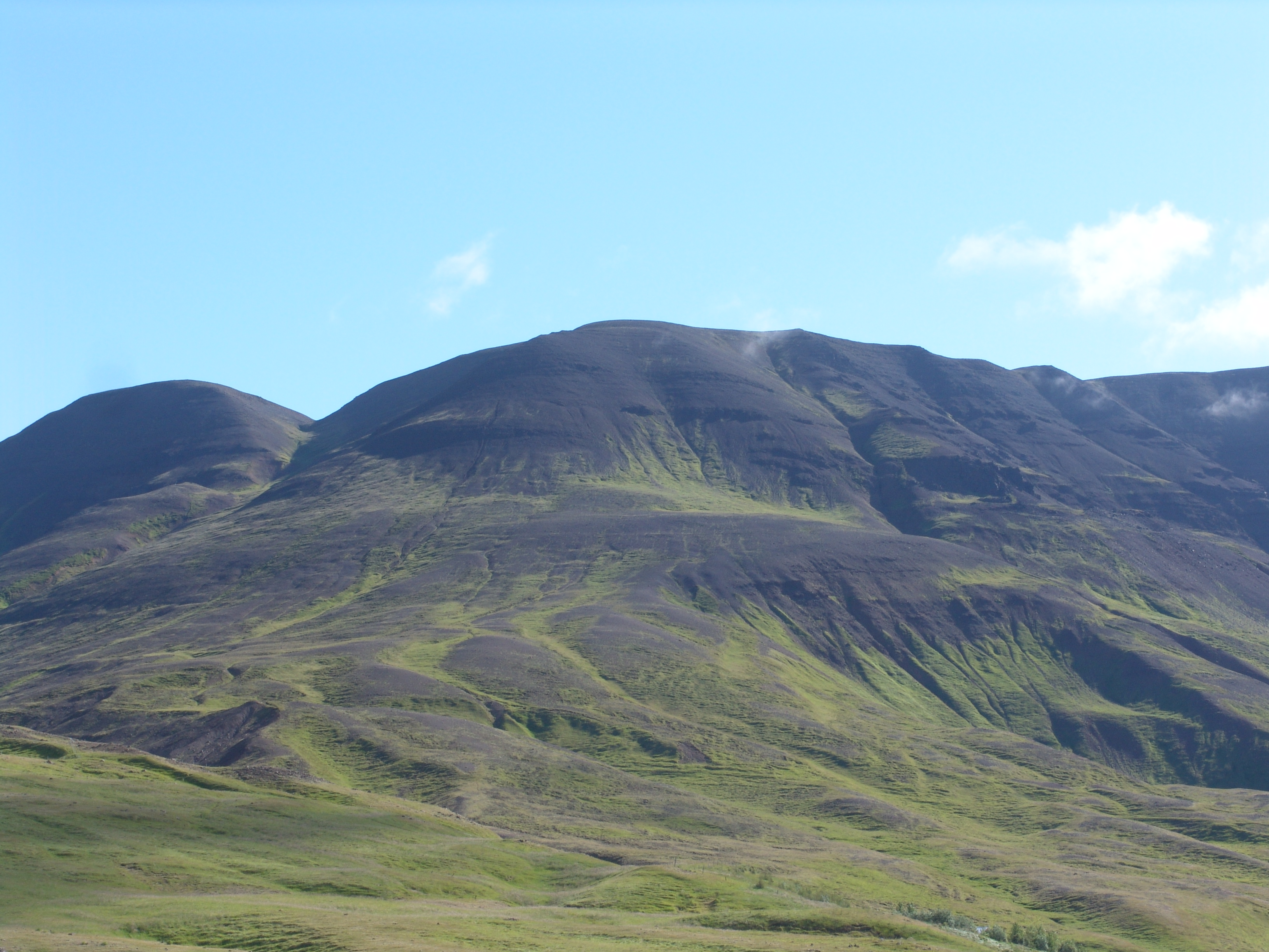 Island, Landschaft.